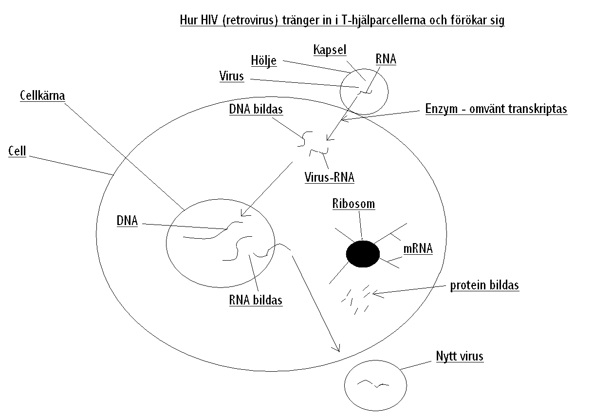 Hur ett retrovirus tränger in i en T-hjälparcell och förökar sig Egengjord bild